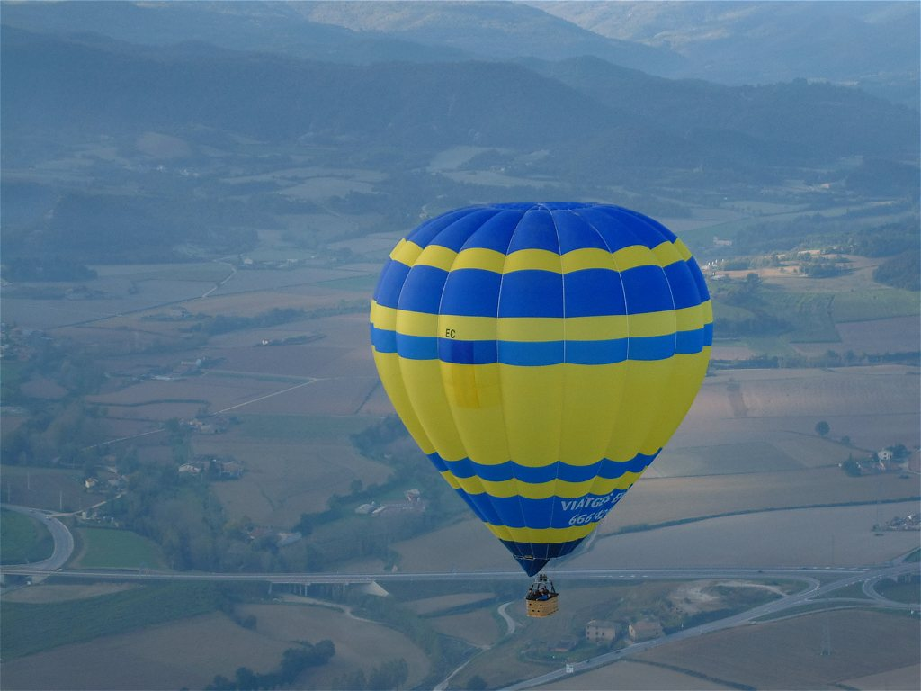 Vuelo turístico Descripción: Globo aerostático sobrevolando La Plana de Vic Fecha: 09/11/2002 Hora: 10:16 Cámara: FinePix 6900Z ISO: 100 Tv: 1/500 Av: 3.2 Autor: aTarom